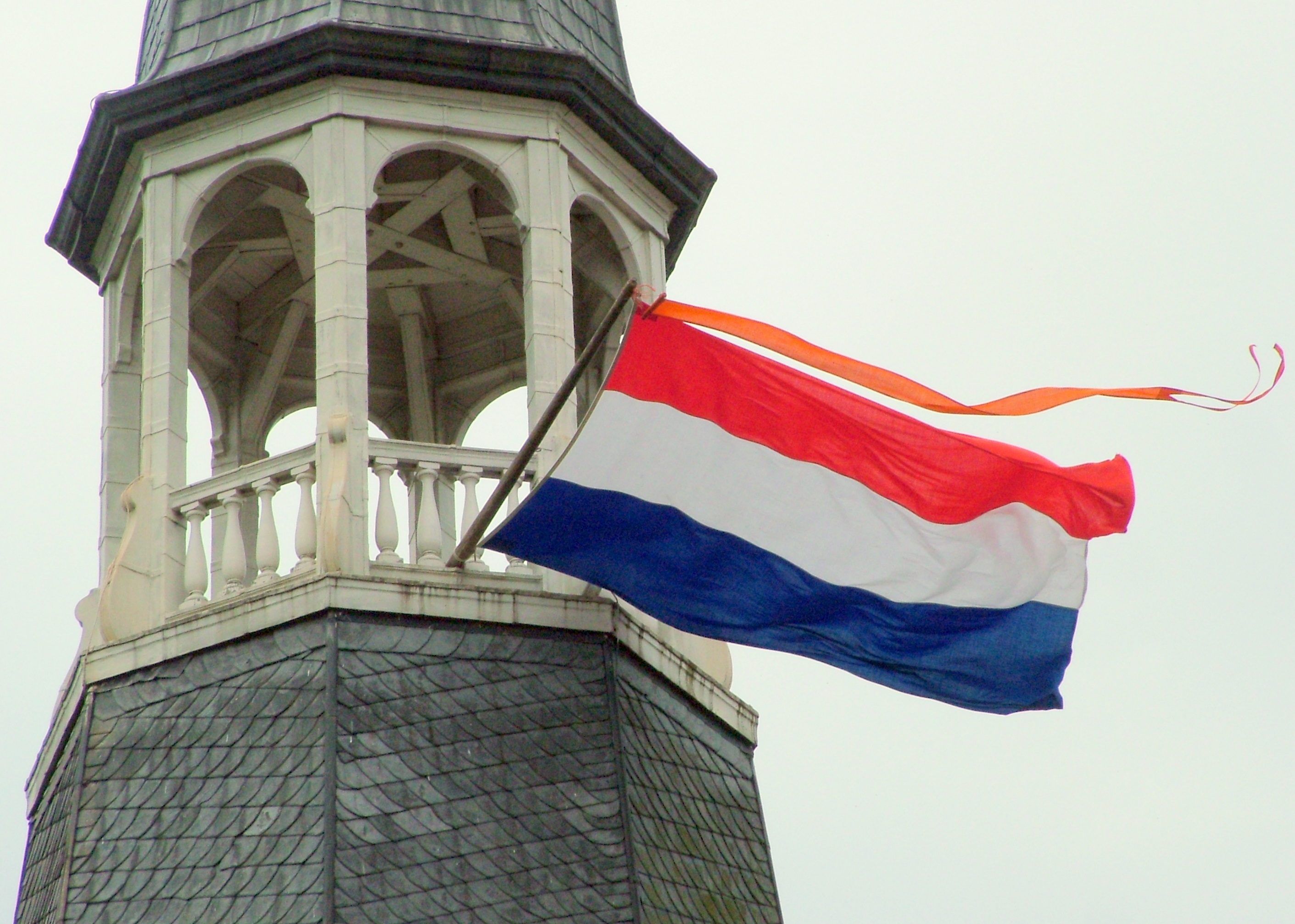 Kerktoren Oude St Mauritius, Silvolde, Koninginnedag 2008. Toren uit ca. 1570.